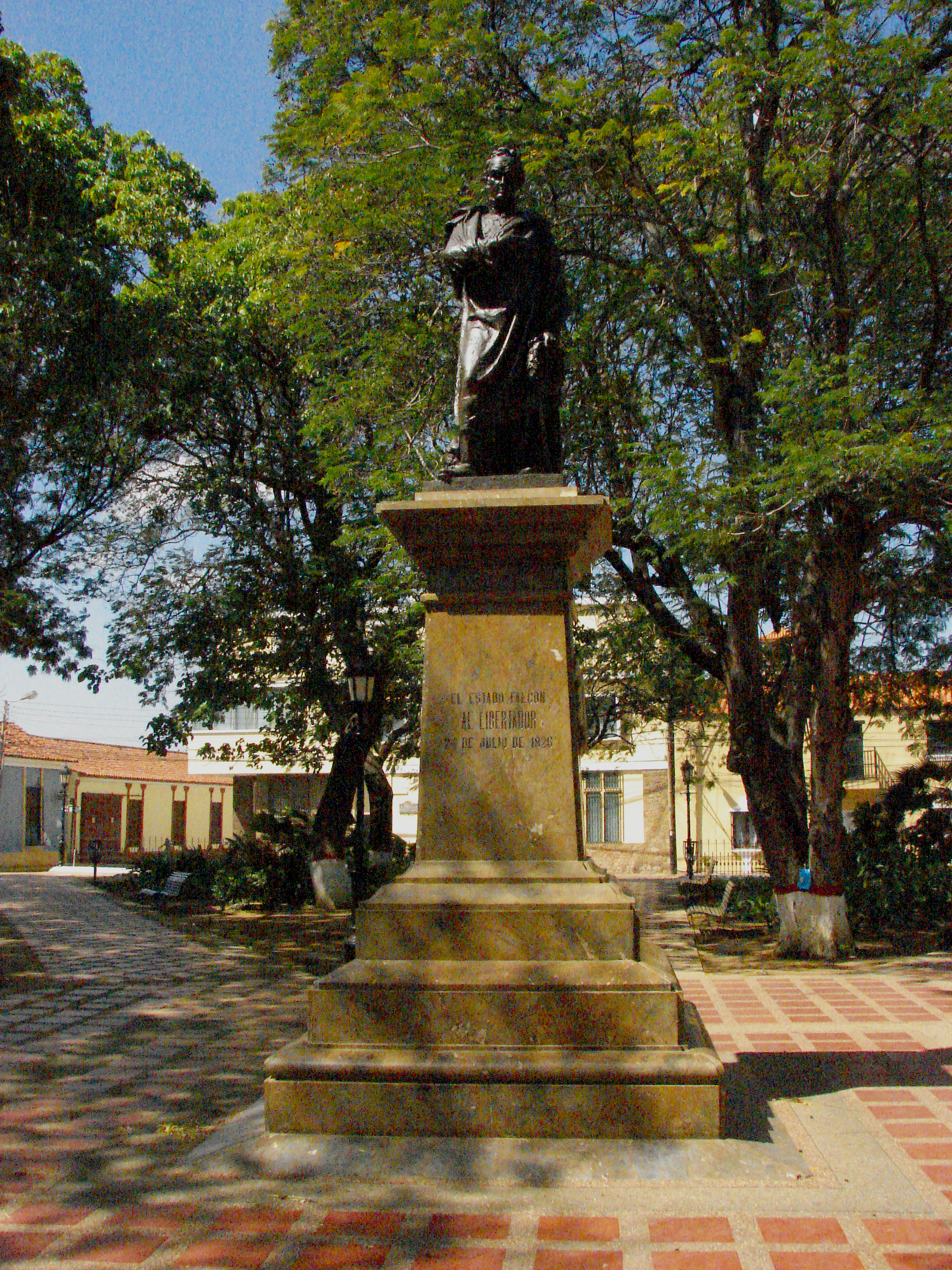 Santa Ana de Coro, Estado Falcón